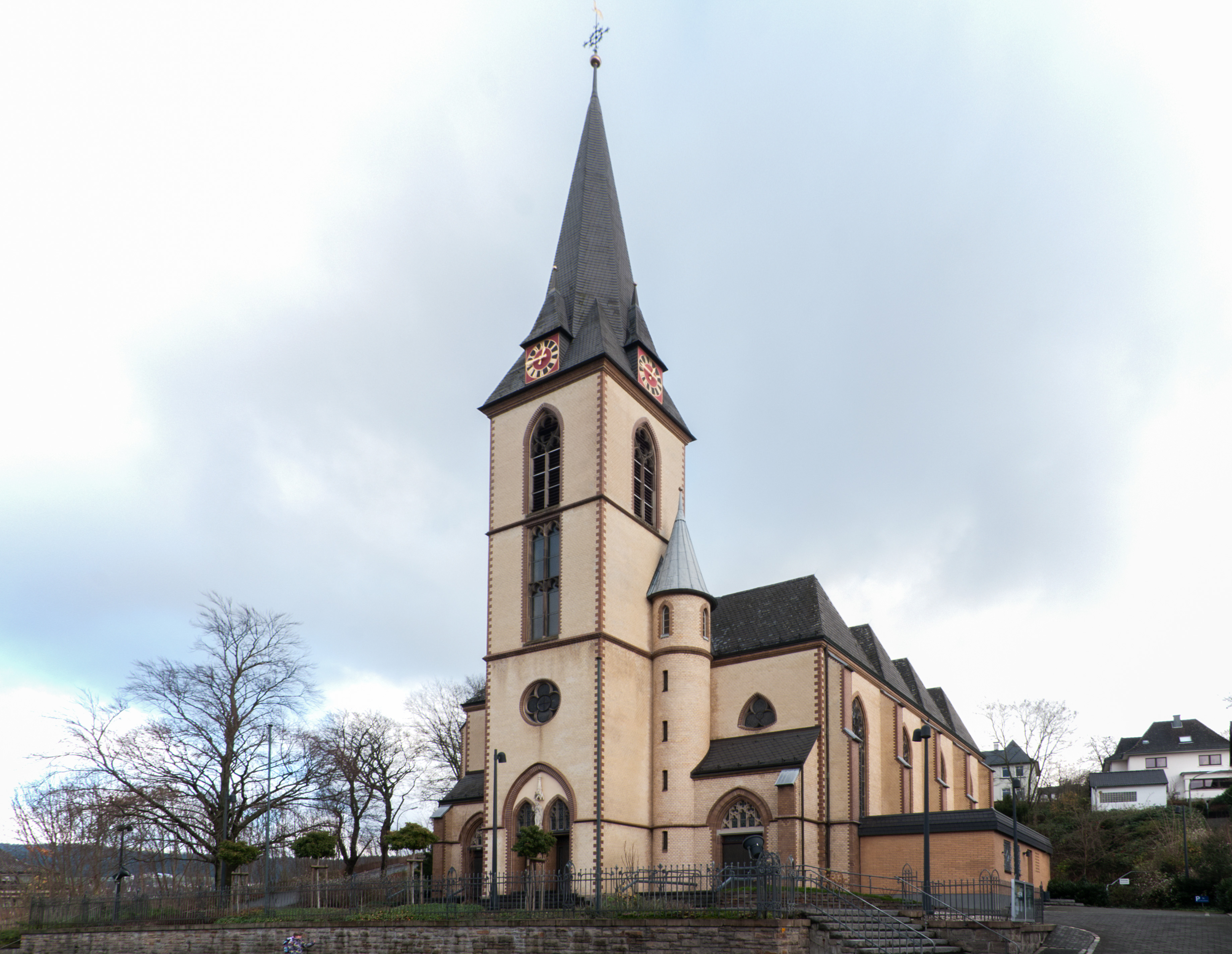 Oeventrop, Pfarrkirche Heilige Familie, Ansicht von Süd-West; Denkmalliste Stadt Arnsberg Nr. 136